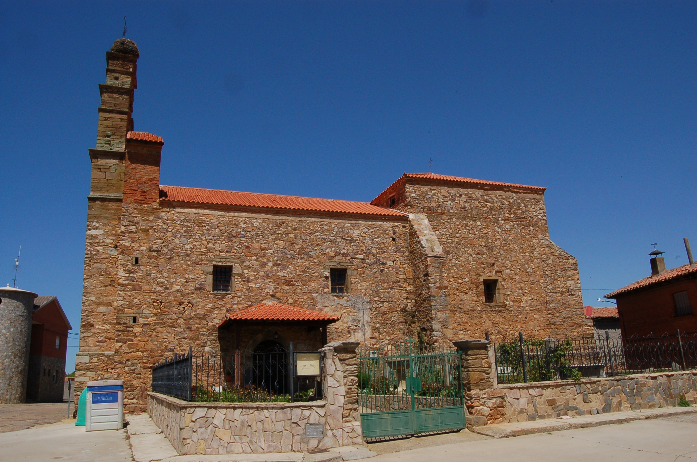 Igrexa de Alcubilla de Nogales